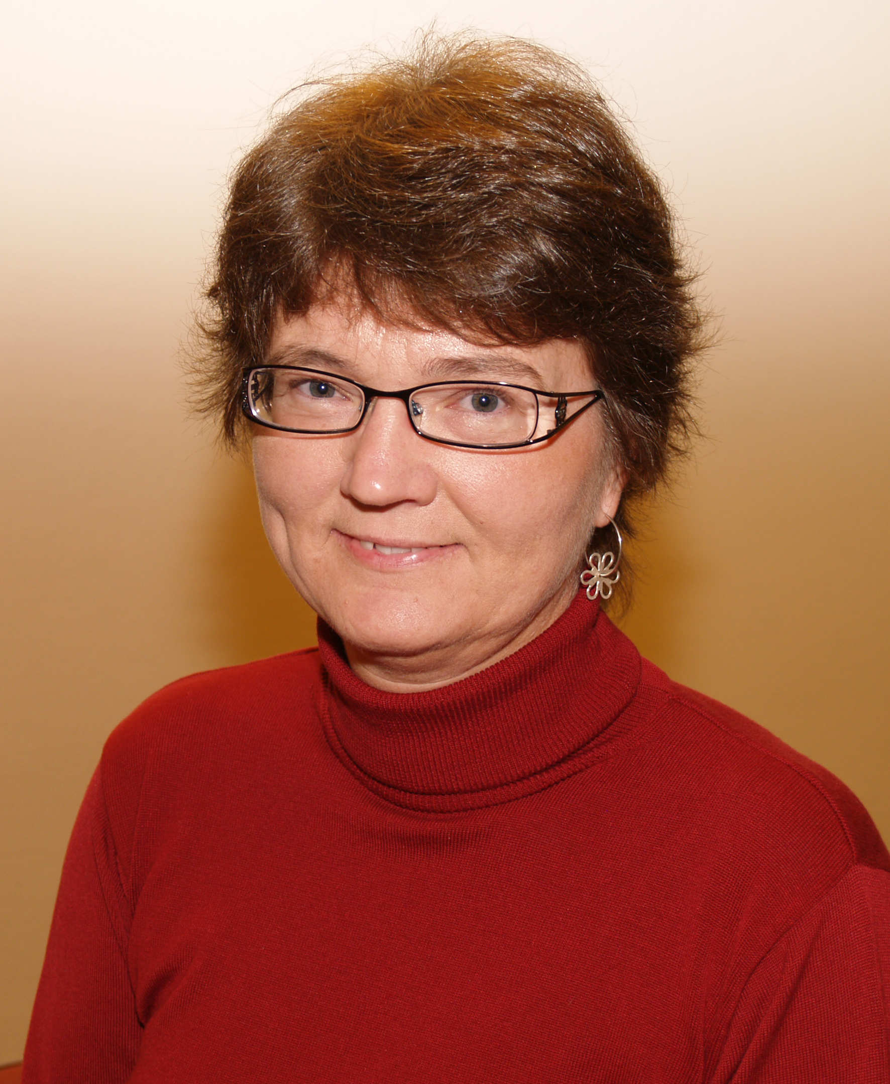 Berit Hagen Agøy, leder av Mellomkirkelig råd for Den norske kirke og lektor med hovedfag i historie.